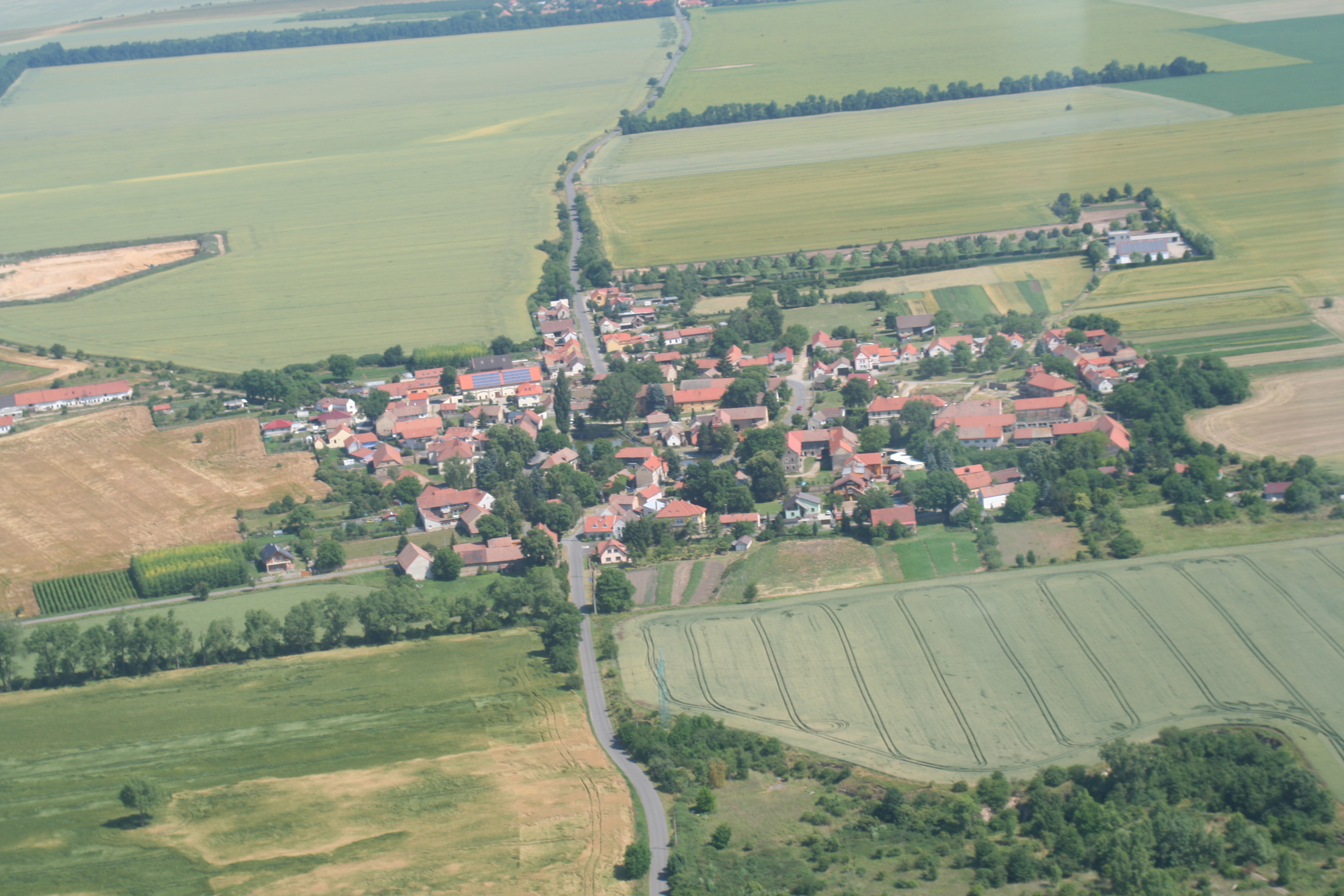 Miletice (okr. Kladno), letecký pohled od jihu